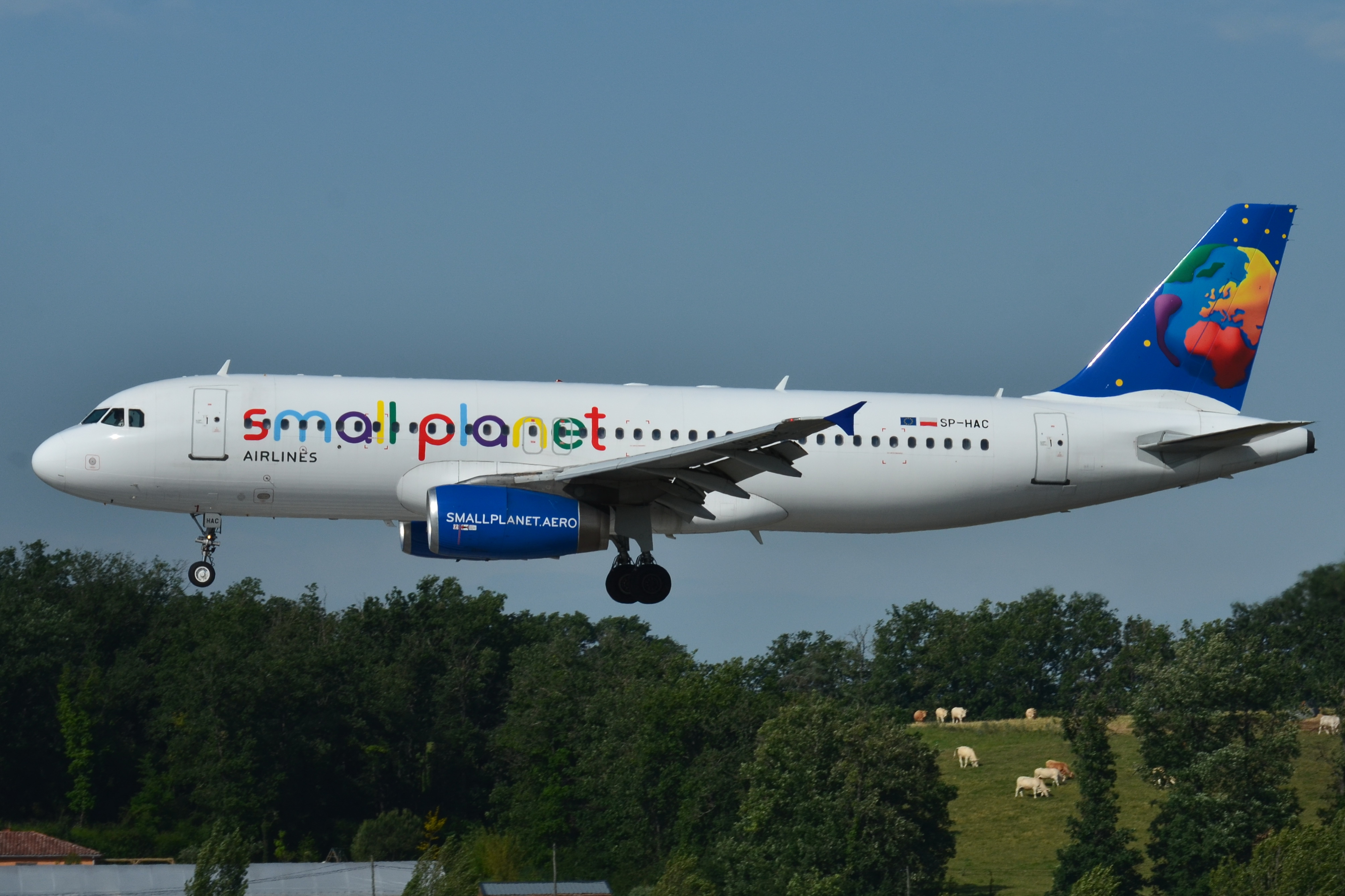 Photo prise à l'aéroport de Toulouse-Blagnac (LFBO) en France. Picture take at Toulouse-Blagnac Airport (LFBO) in France.